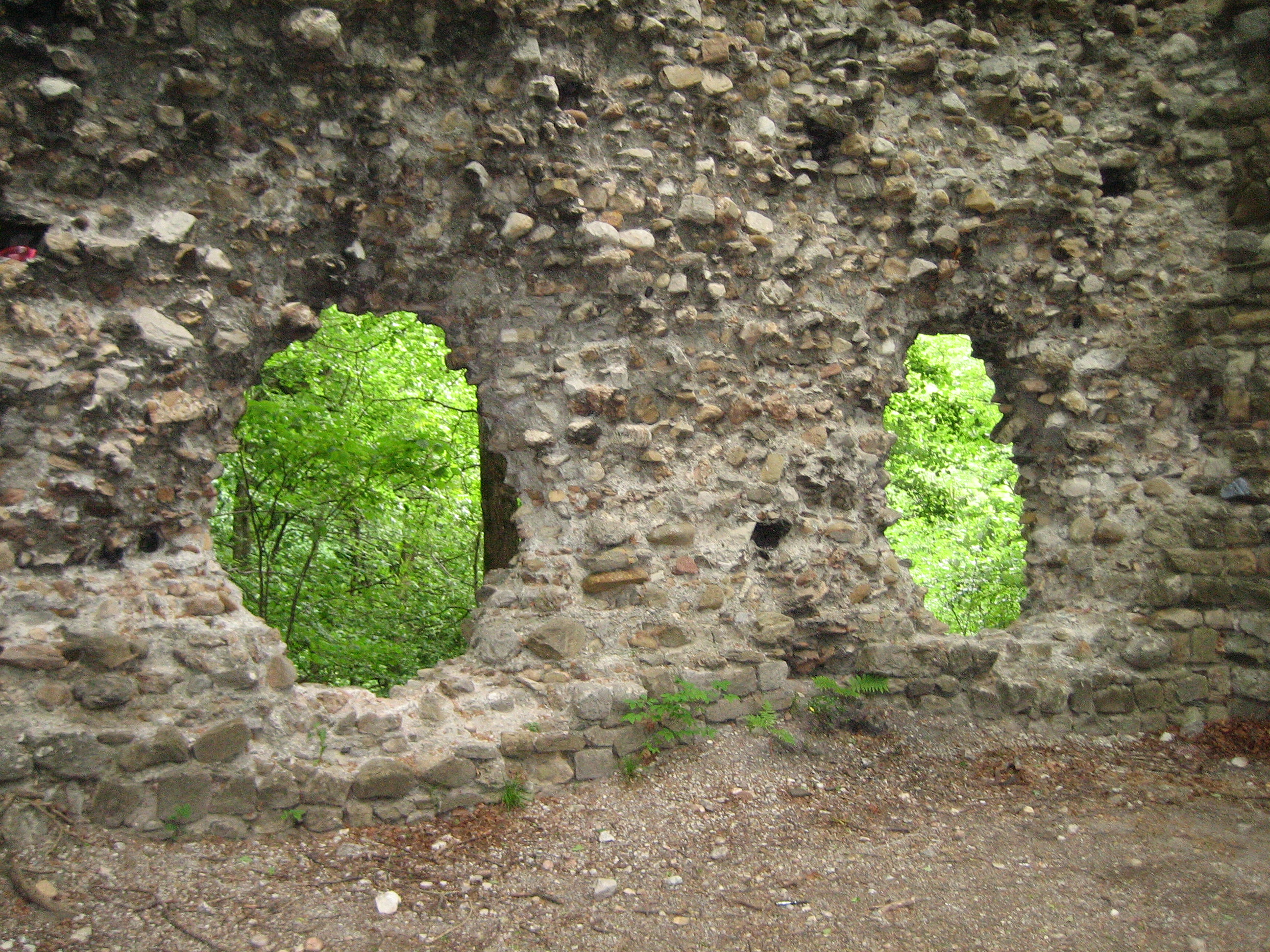 Ruine Niederwindegg: innen